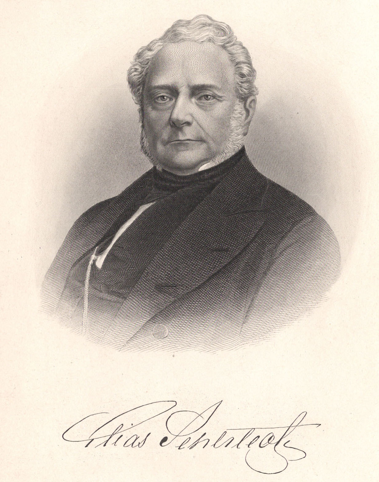 Elias Sehlstedt (1808-1874)